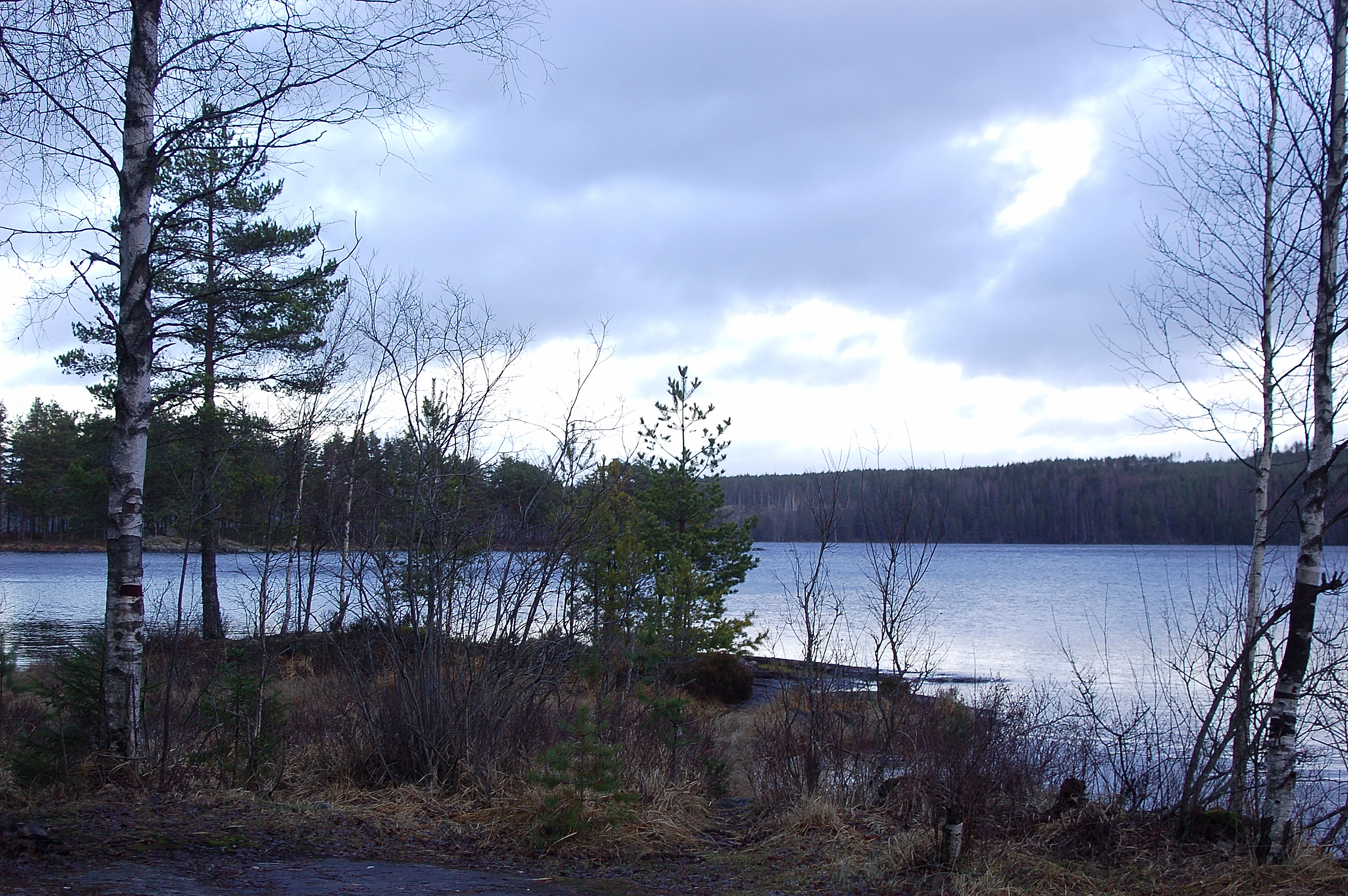 Gränssjön vid Storviken i Glaskogens naturreservat.